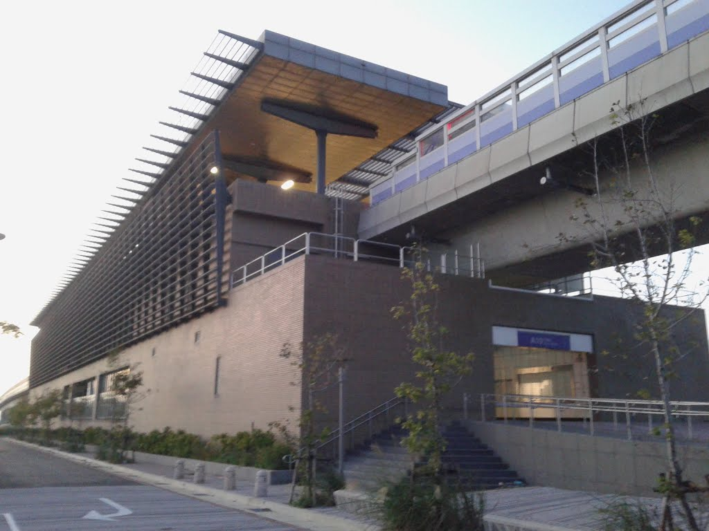 桃園機場捷運山鼻站